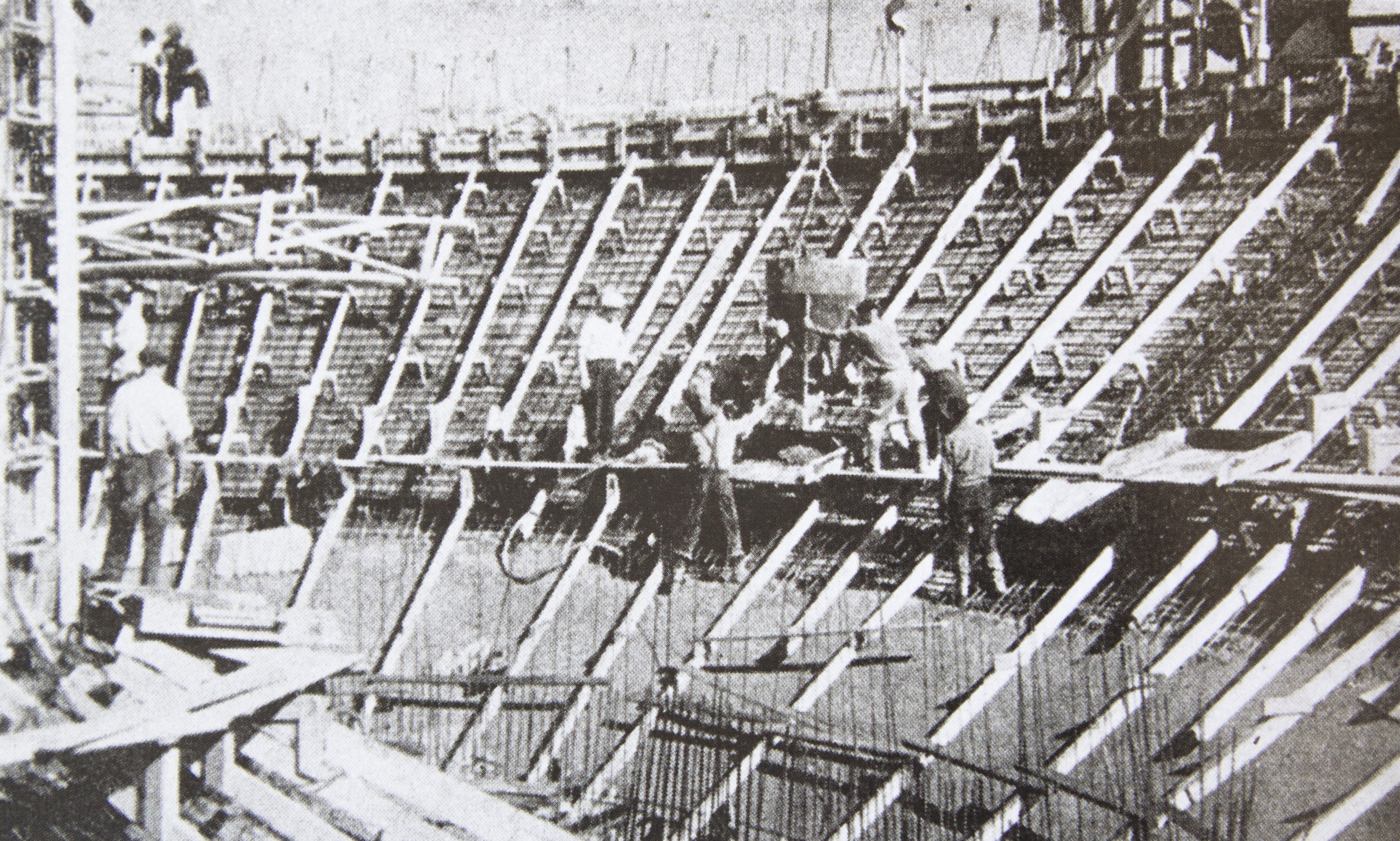 Vesisäiliön valutyöt meneillään vuonna 1958.